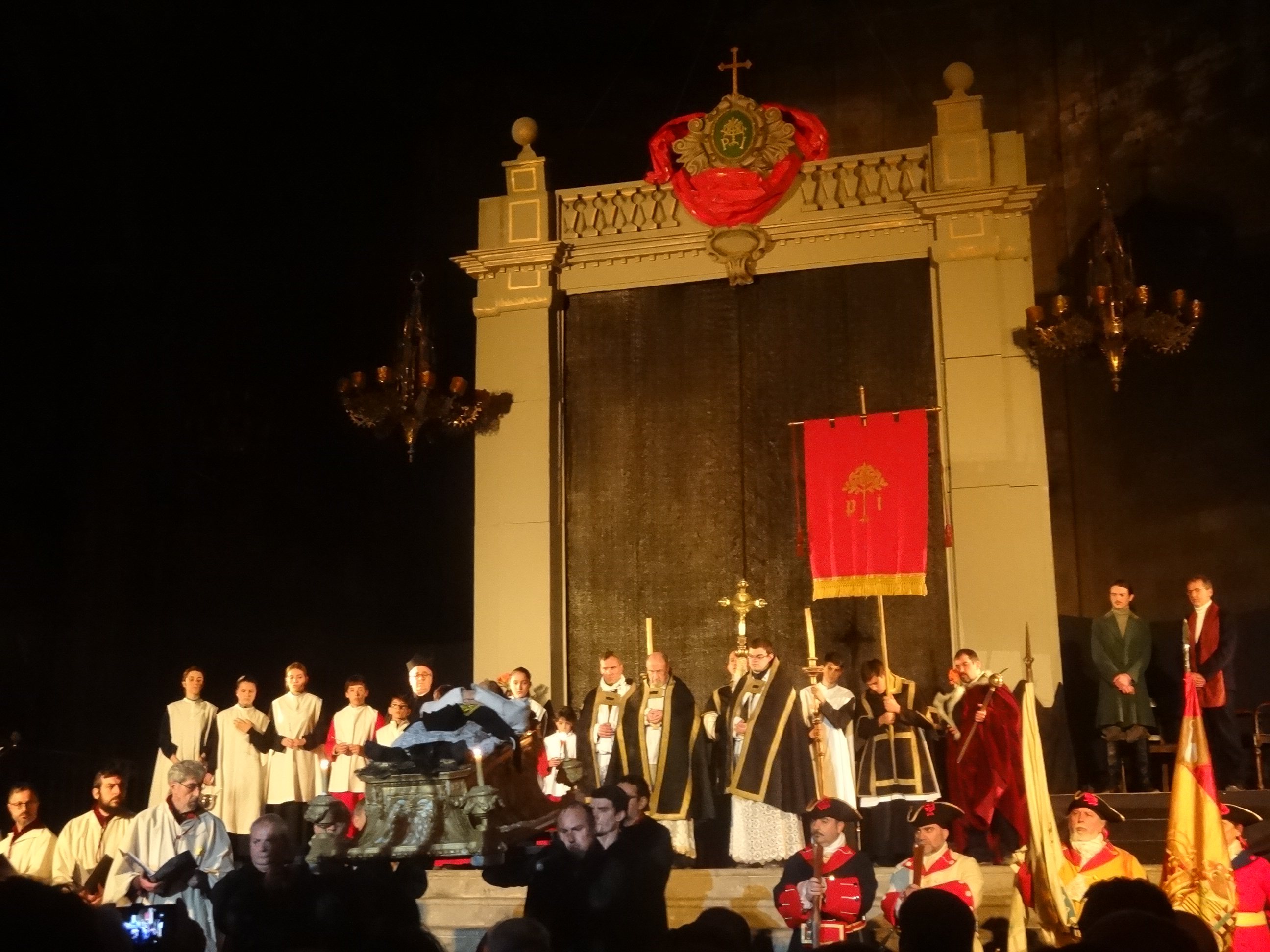 2018_03_17 Basilica del Pi - Representació del Retaule de Sant Josep Oriol